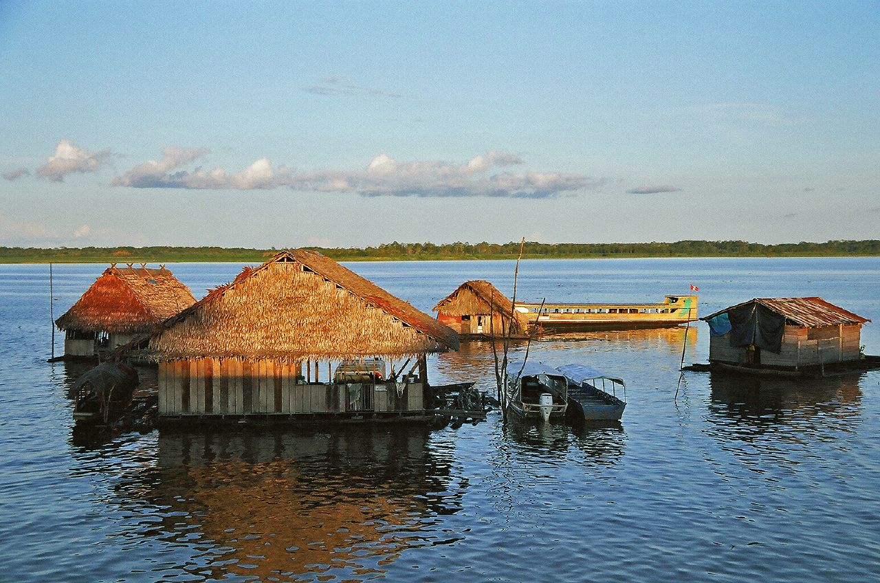 Casas flotando a la deriva del río Amazonas.